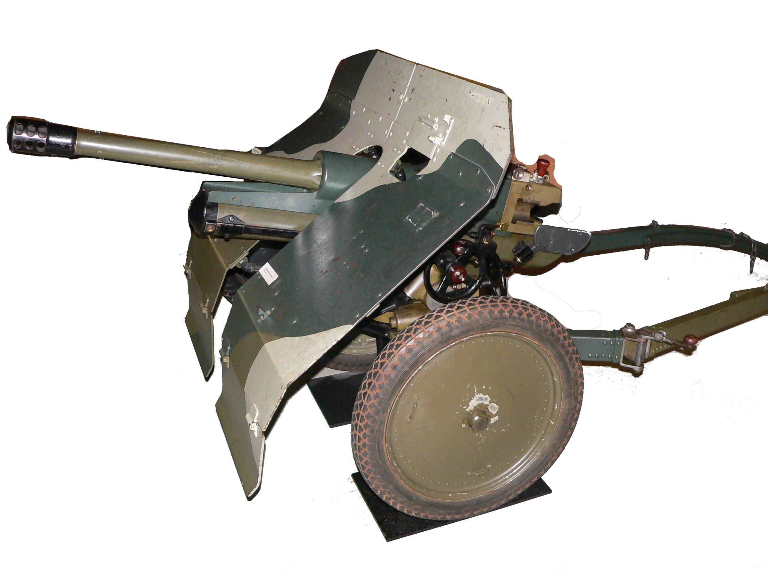 canon anti-char suisse